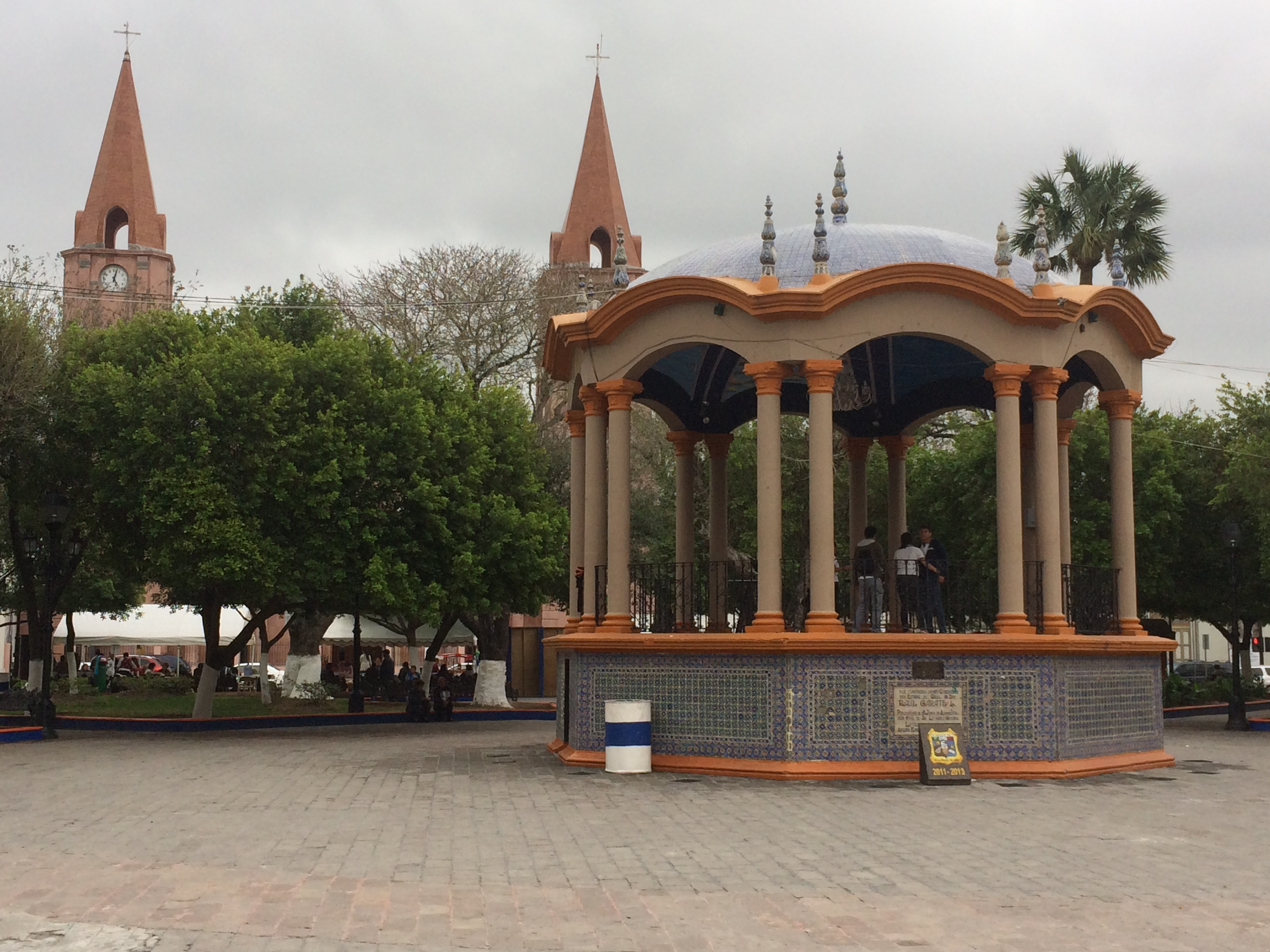 Matamoros